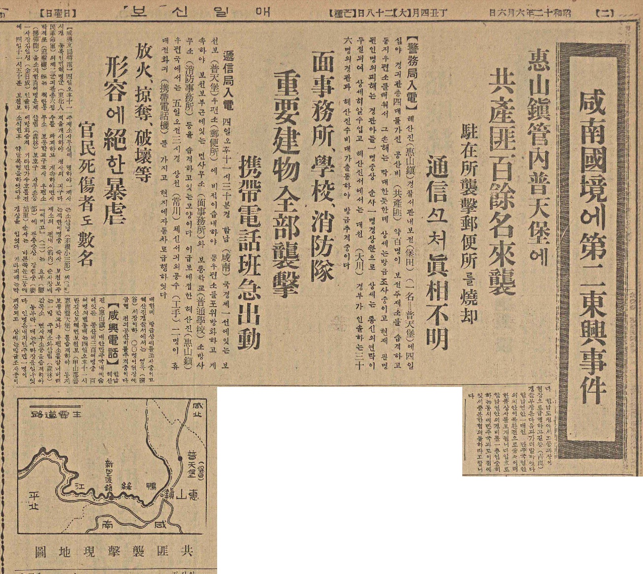 1937년 6월 4일의 보천보습격 사건은 제2동흥사건이라 보도한 매일신보의 동년 6월 6일자 02면 01단 기사